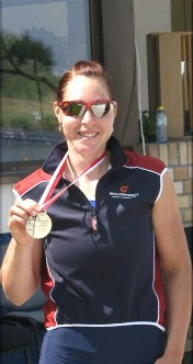 Agnieszka Renc - zdjęcie wykonane na MP Seniorów 2010